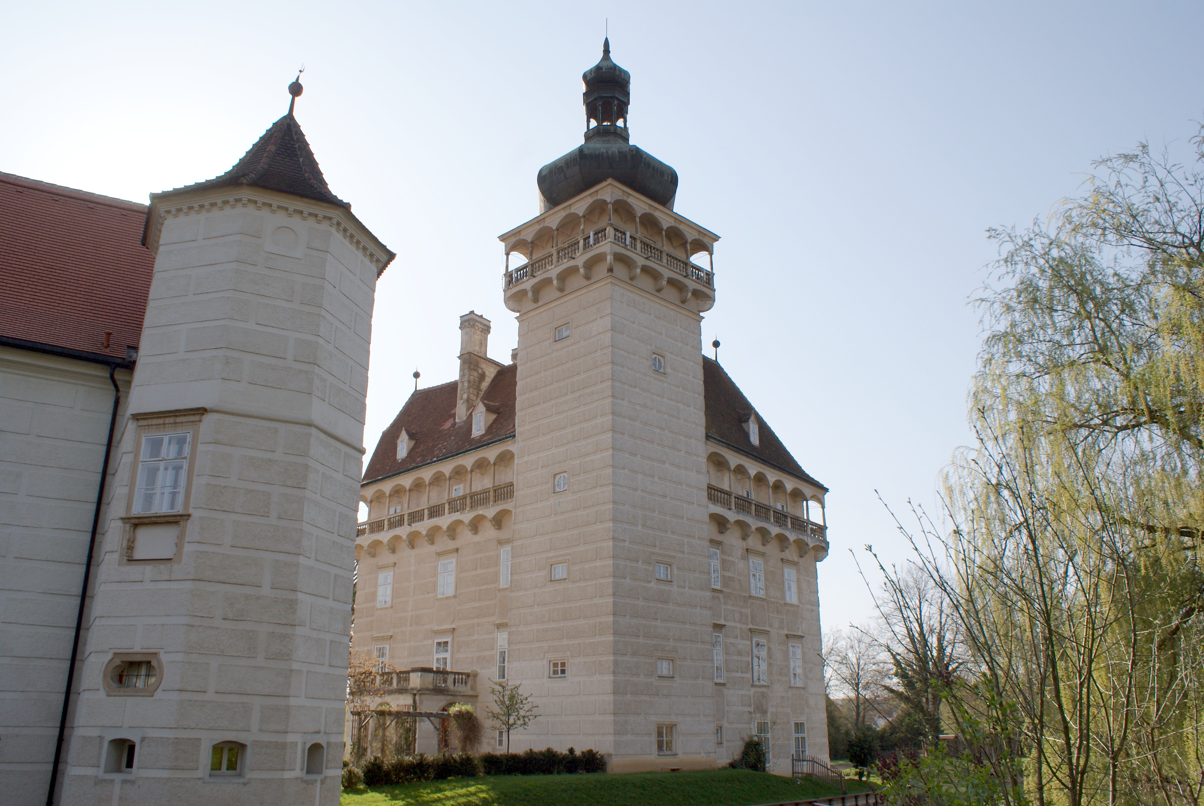 Turm des Schlosses Pottenbrunn